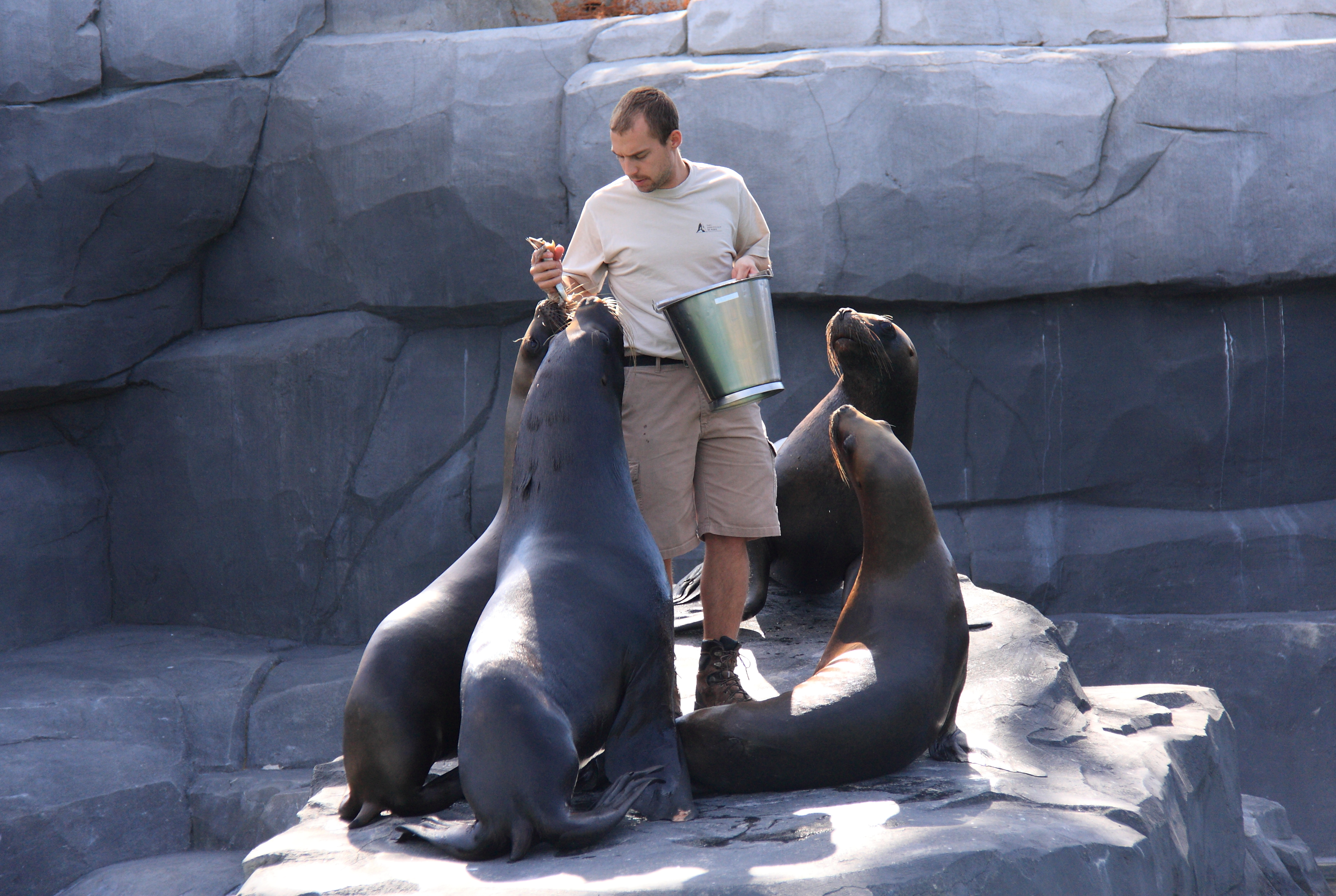 Otariidae - Parc Zoologique de Paris.